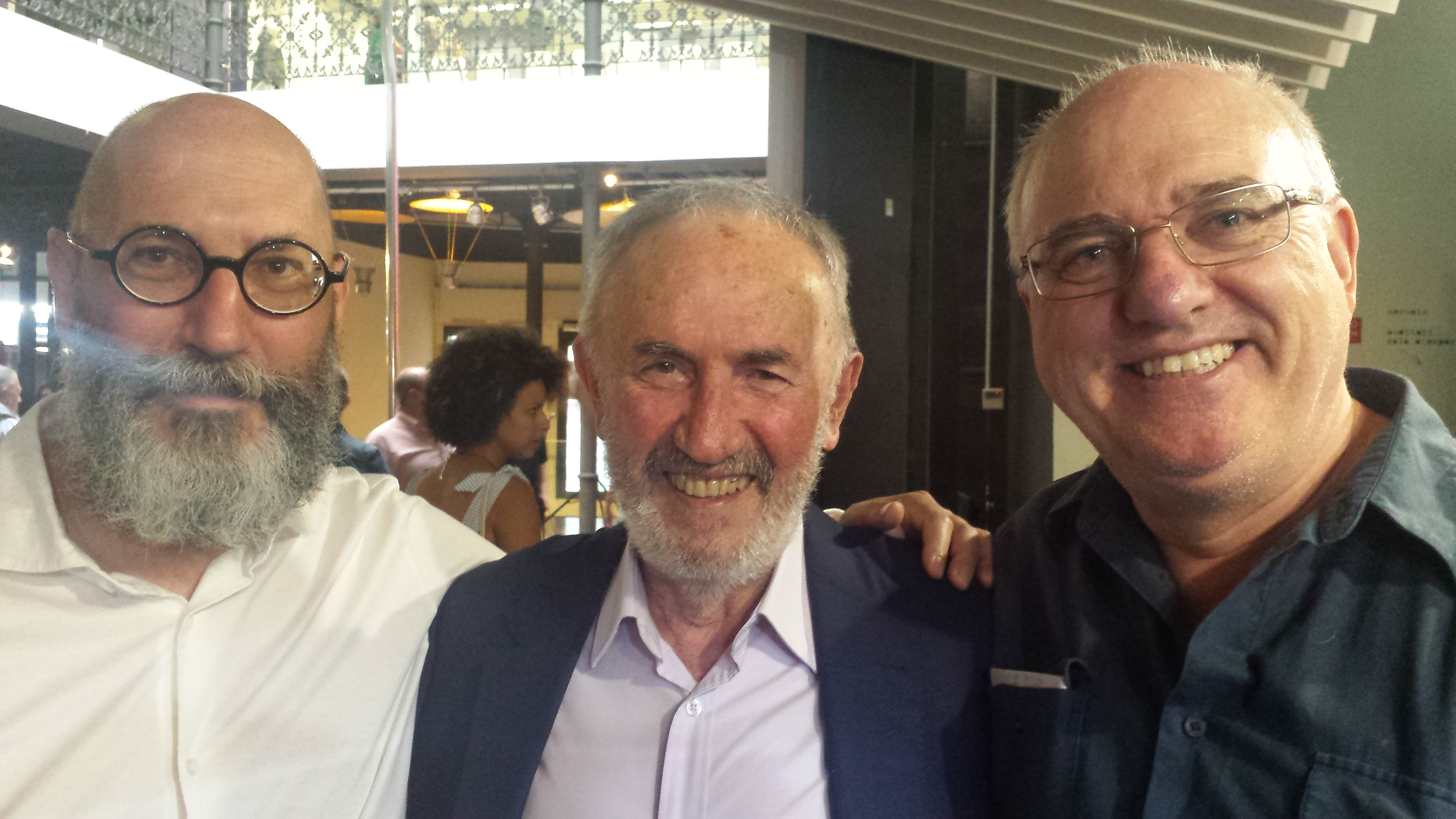 Homenatge a Pérez-Montaner, Octubre CCC, 2018